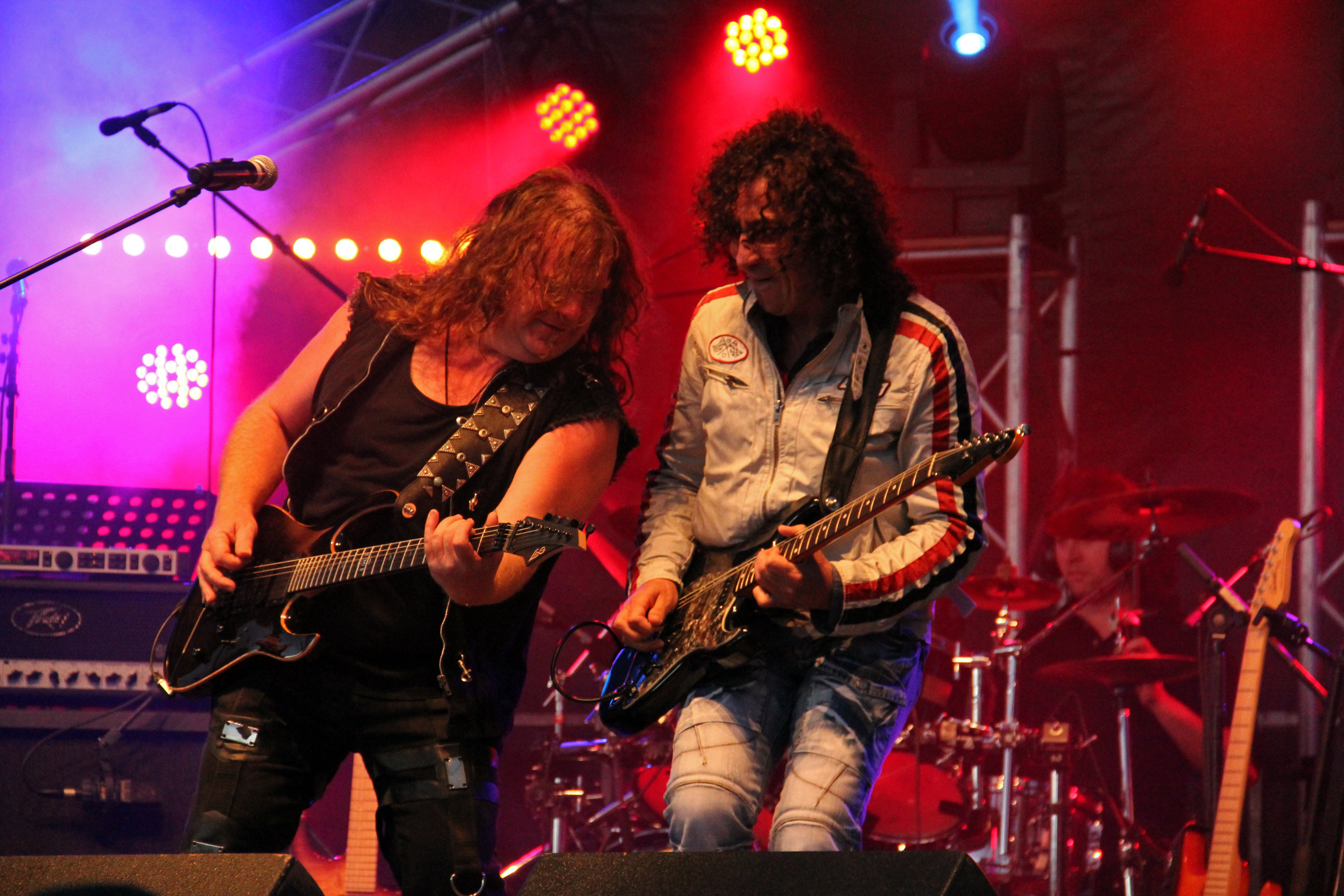 Pat O'May accompagné du guitariste Norbert Krief dit Nono le 7 août 2011 à Hillion.